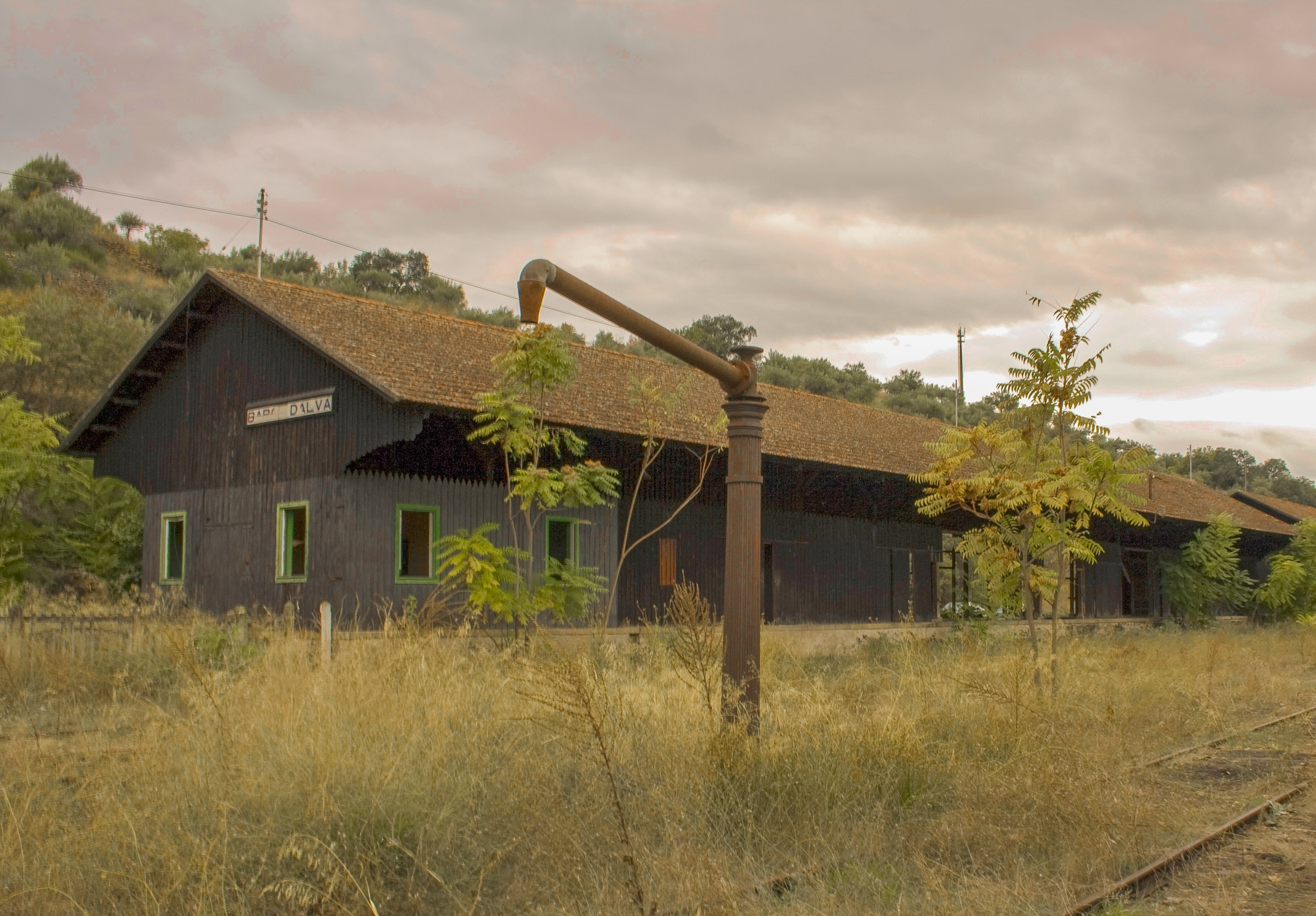 Estación internacional España-Portugal